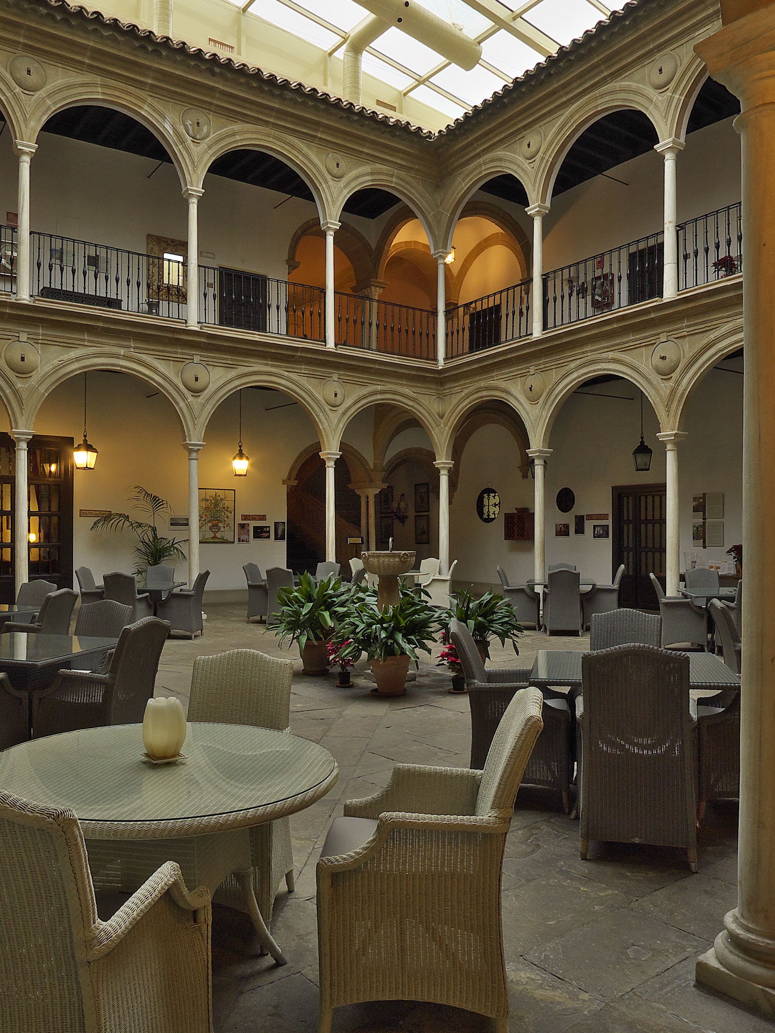 Patio del palacio de Fernando Ortega Salido, de mediados del XVI y de autor u autores sin documentar. Se atribuye a Andrés de Vandelvira.